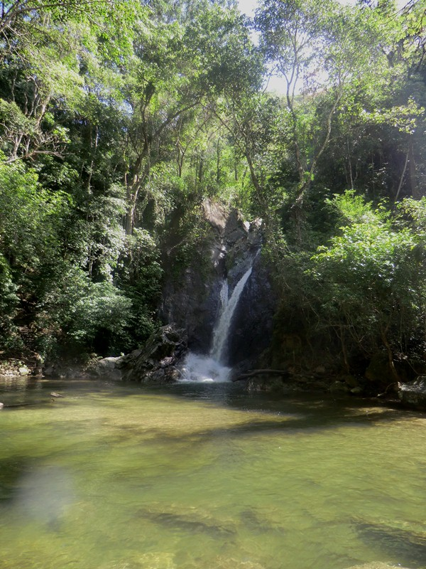 Pequeño salto de agua en el río del Norte. Guatire. Estado Miranda. Venezuela.